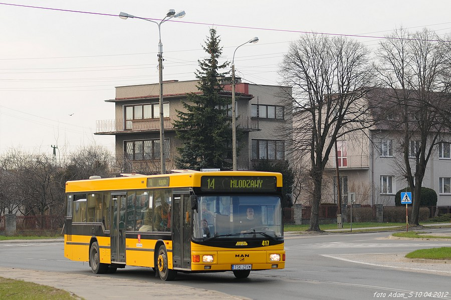 MAN NL202 MKS w Skarżysku-Kamiennej